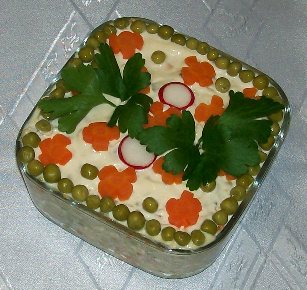 Sałatka jarzynowa z majonezem {szałot)